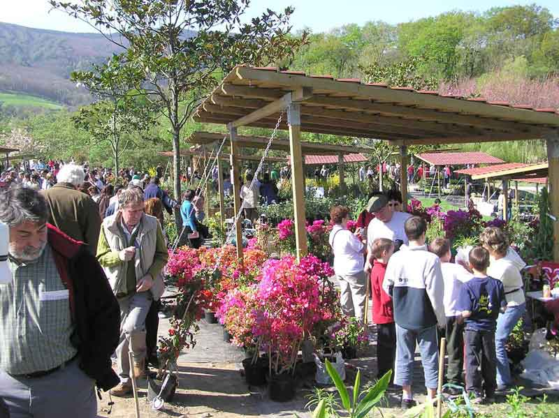 Feria de Plantas de Colección, Jardín Botánico de Iturraran, Parque Natural de Pagoeta